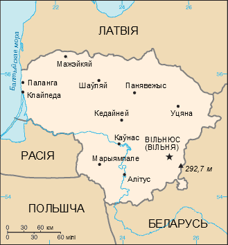 Карта Літвы